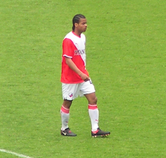 Erixon Danso, Nederlands voetballer